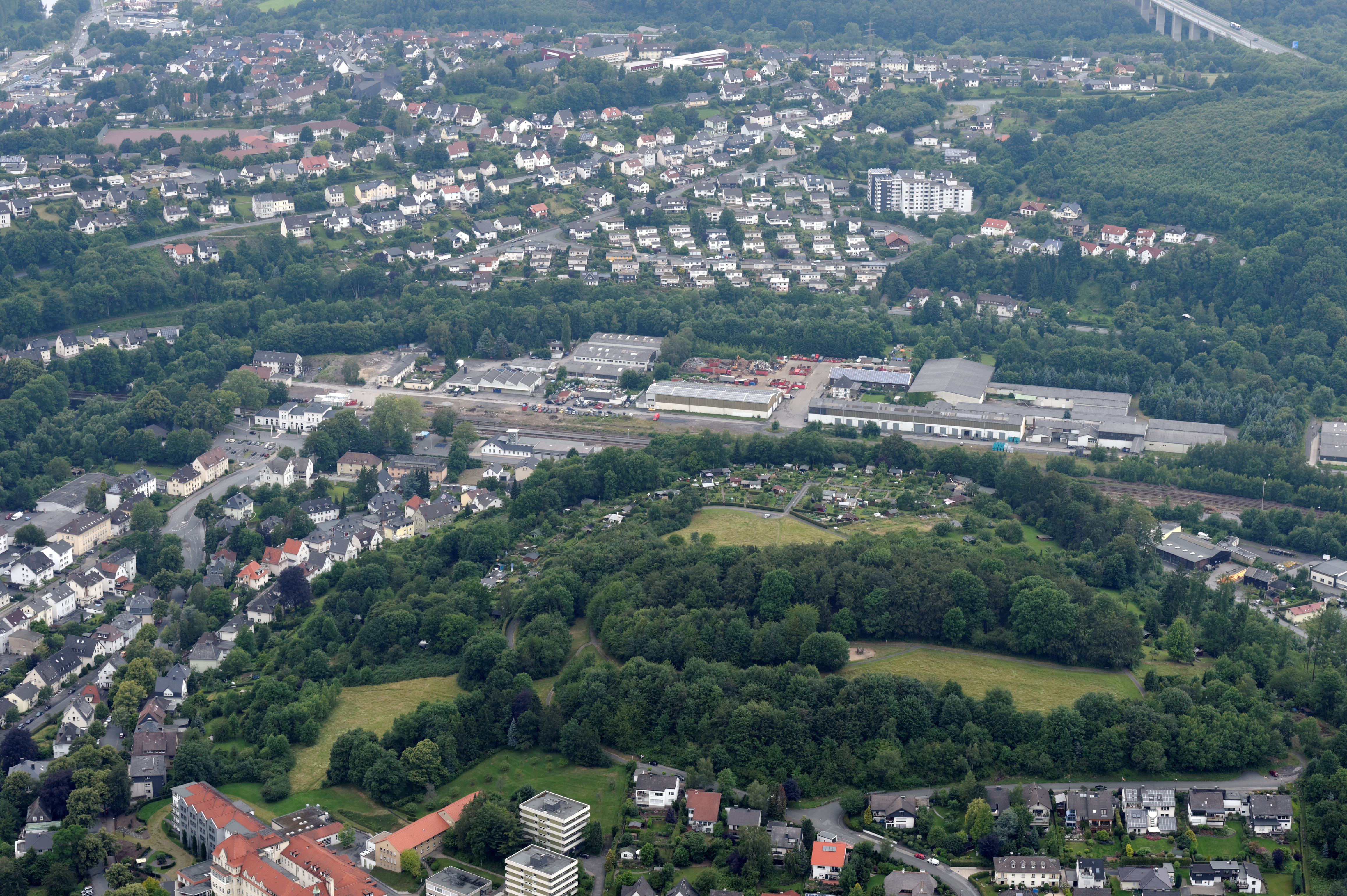 Arnsberg: Lüsenberg, Bahnhof mit Industriegebiet, Wohngebiete Grüner Weg/Bördestraße und Schreppenberg (Fotoflug Sauerland Nord) The making of this document was supported by the Community-Budget of Wikimedia Germany.